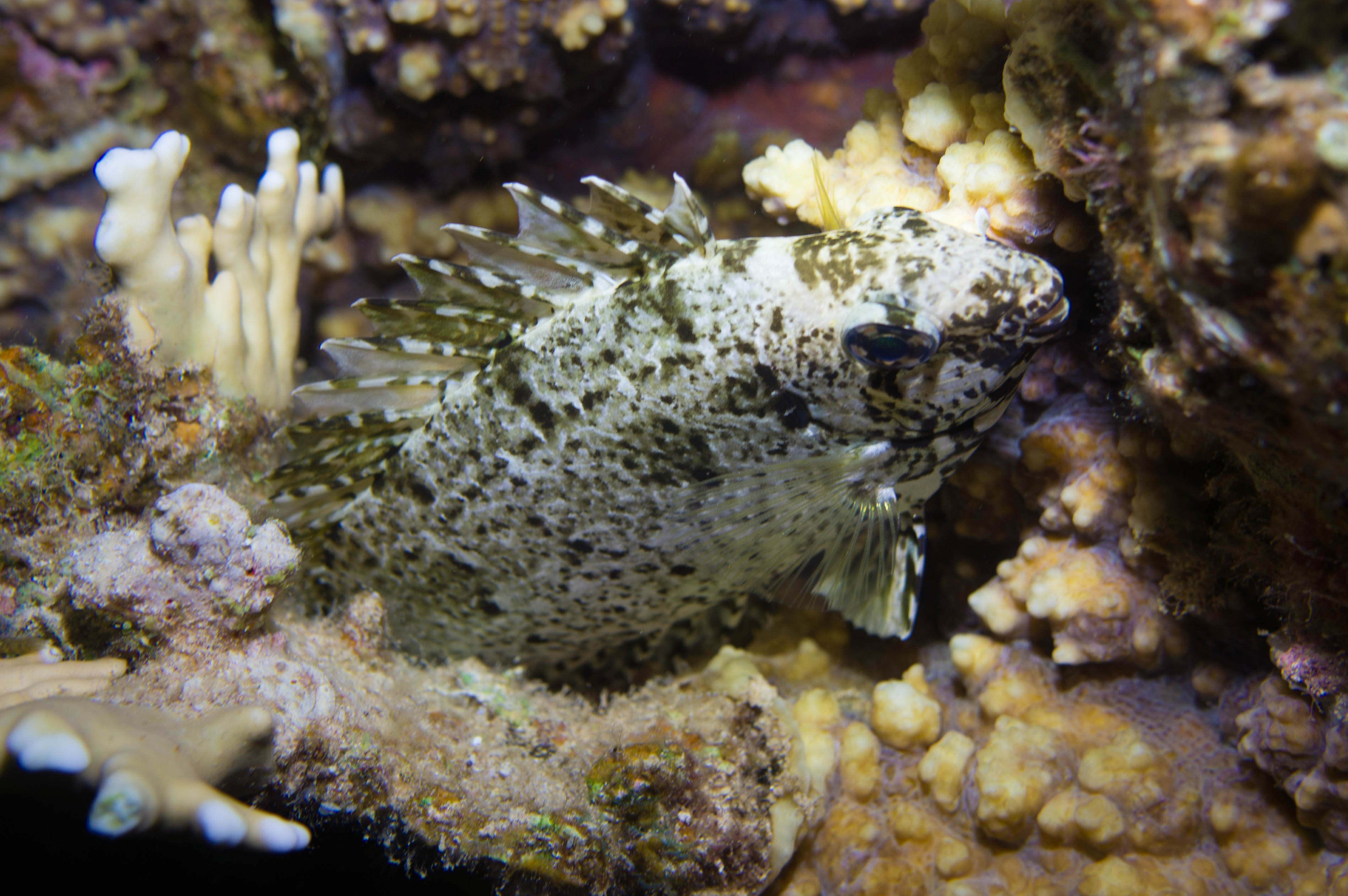 Siganus luridus, con el traje de camuflaje en el mar Rojo